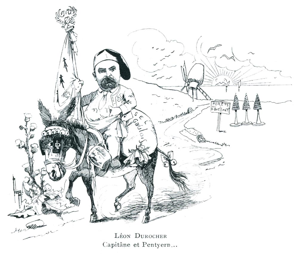 Léon Durocher, Zeichnung von Léon de Bercy, Urheber 1915 verstorben, Veröffentlichung 1914